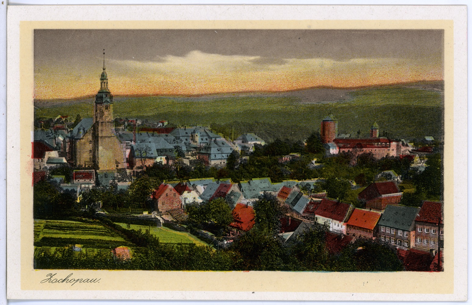 Zschopau; Blick auf Zschopau This postcard is from publisher Brück & Sohn in Meißen ( postcard has a unique number 23602 and is available in a higher resolution at the publisher. This images was uploaded in a cooperation project between Wikipedians and the publisher.